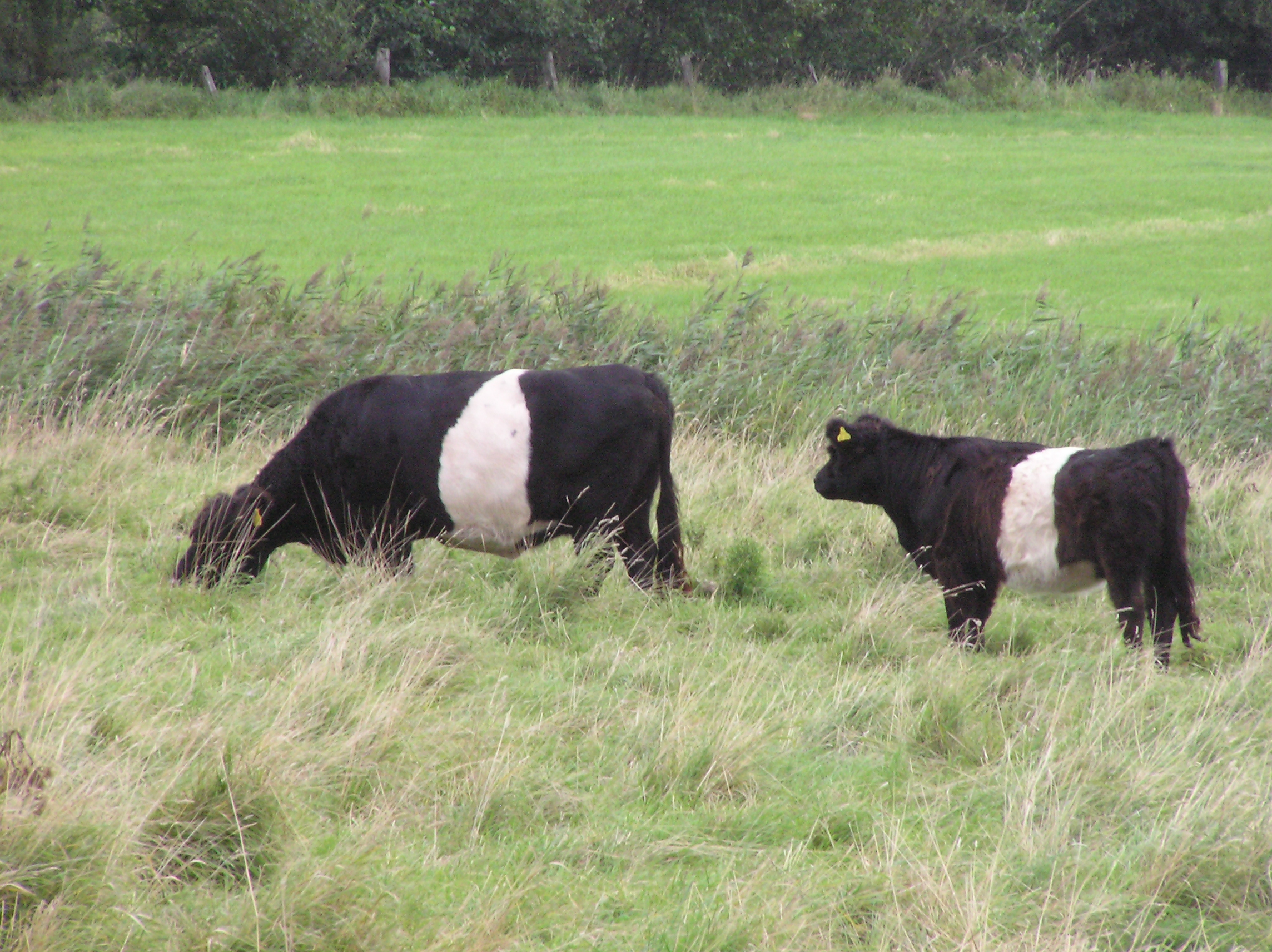 Belted Galloway in Nordfriesland (Schleswig-Holstein)